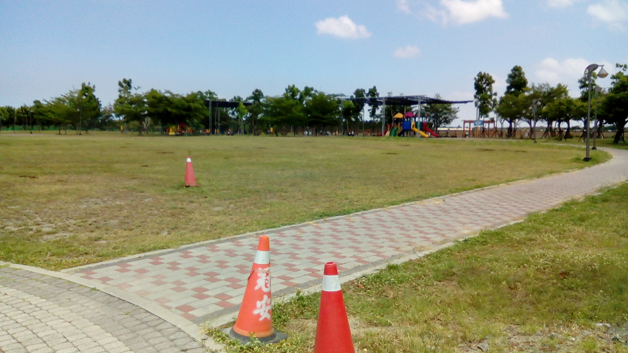 位於佳冬鄉文化一路82號 台一線(戰備跑道)旁 佳冬與枋寮兩鄉的邊境